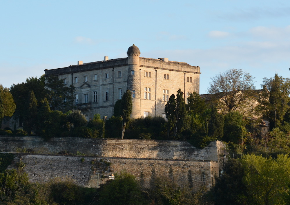 Château de Saint Siffret